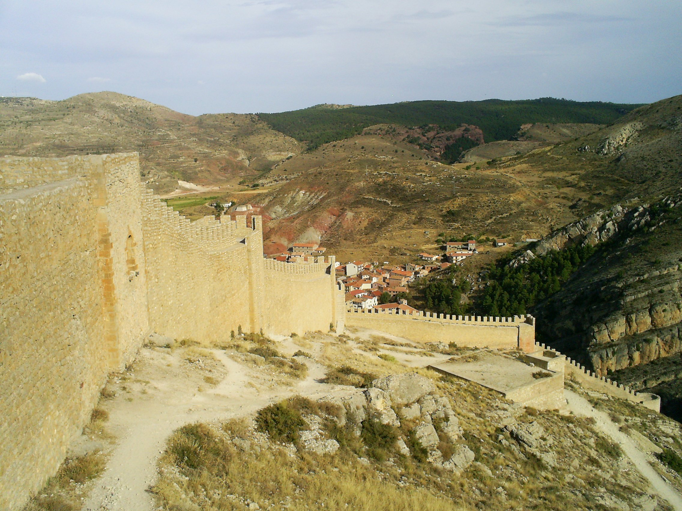 Aragonés: Muralla d'Albarrazín, Tergüel, AragónLooking down